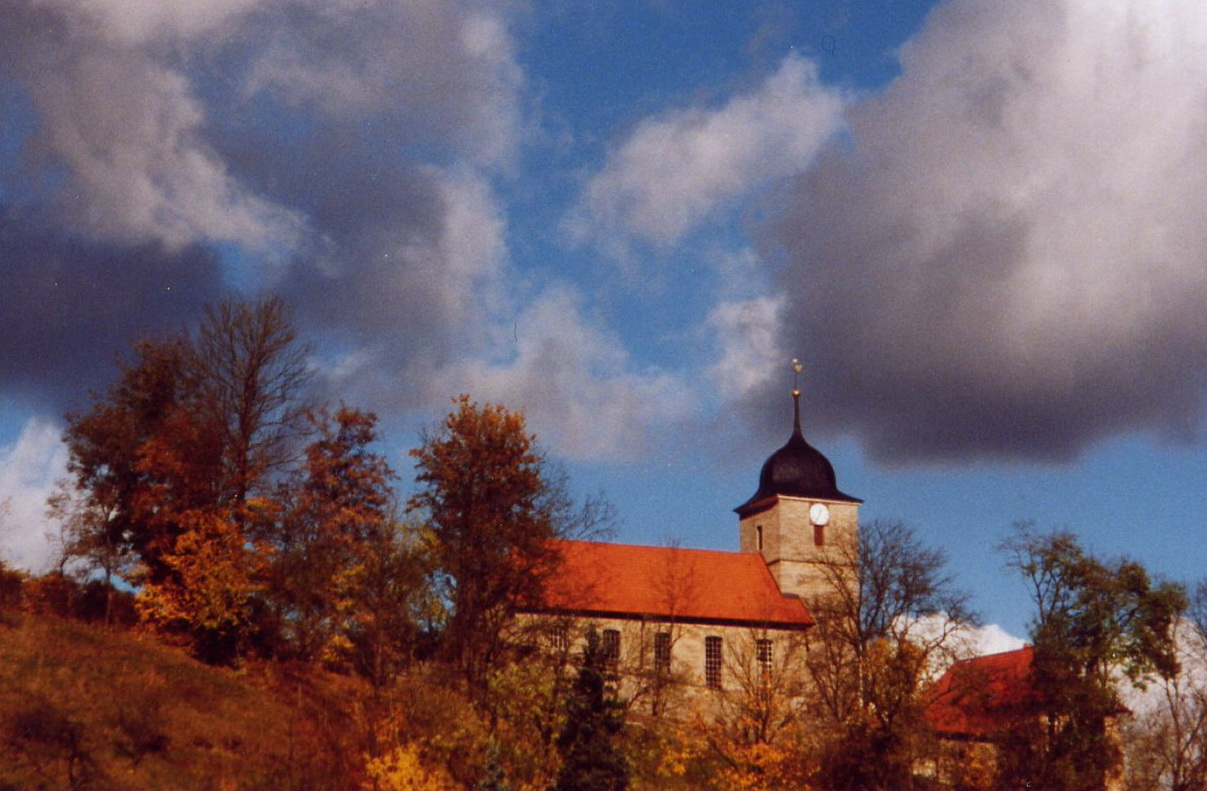 Kirche in Utendorf (bei Meiningen, Thüringen, Deutschland)